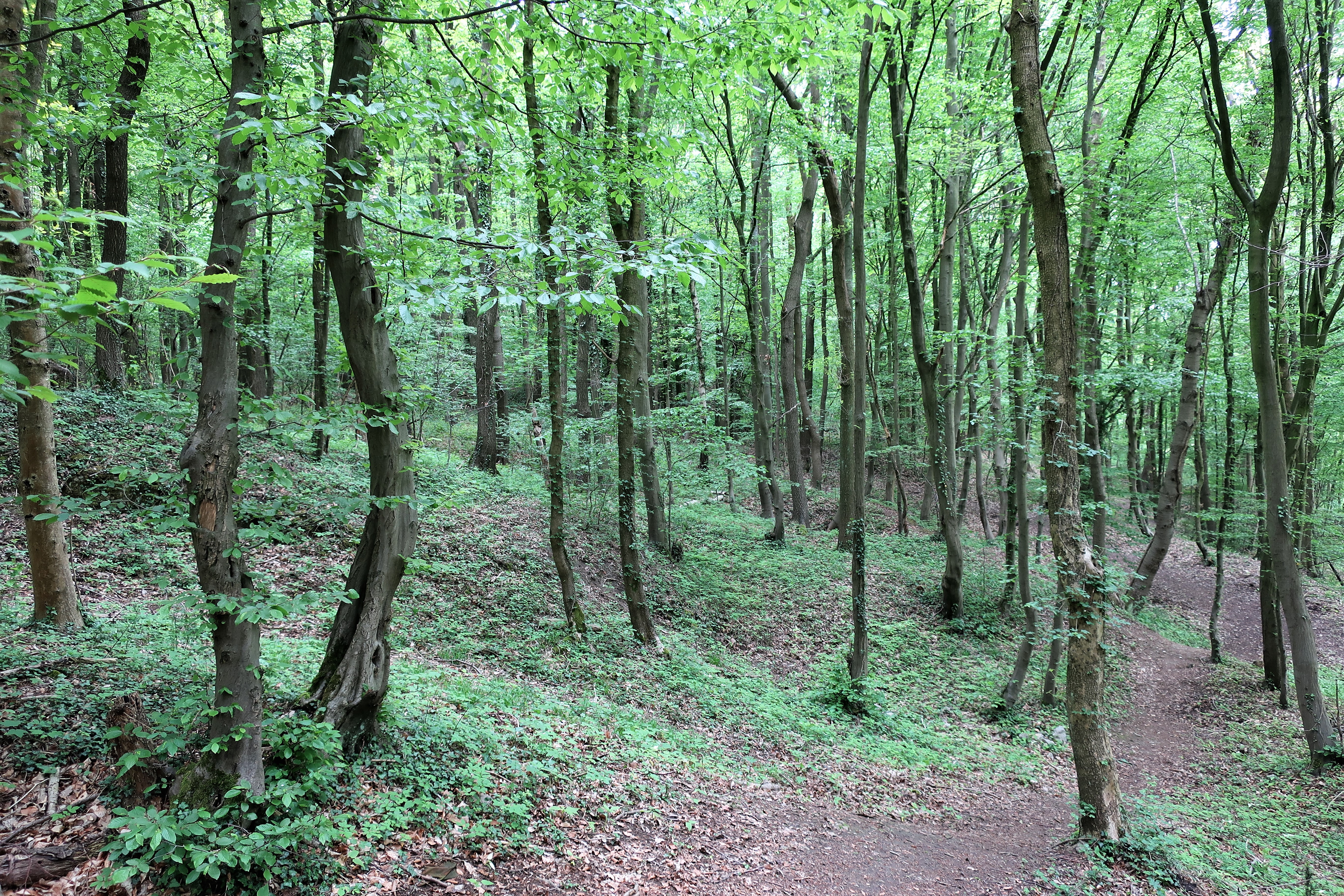 Naturschutzgebiet Hardt (NSG HA-016) in Hagen. Volmehang Emst - Delstern. Waldgebiet nördlich der Straße „Am Berghang“.